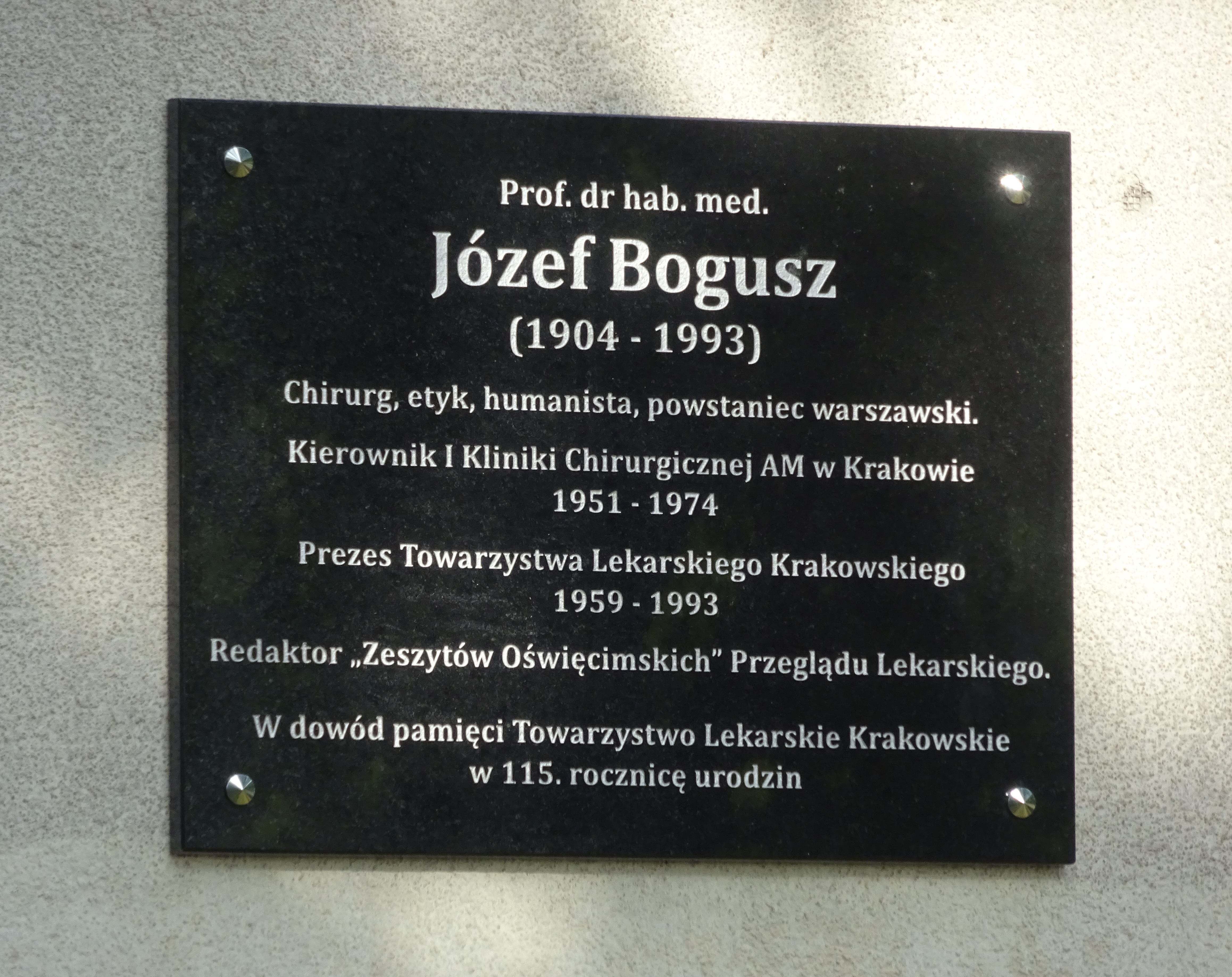 Osiedle Strusia 14, Ulica Józefa Bogusza - tablica upamiętniająca Józefa Bogusza wmurowana w elewację budynku przy ulicy nazwanej jego imieniem na Osiedlu Strusia, w Bieńczycach w 115. rocznicę urodzin, ufundowana przez Towarzystwo Lekarskie Krakowskie. Kraków, 2019.